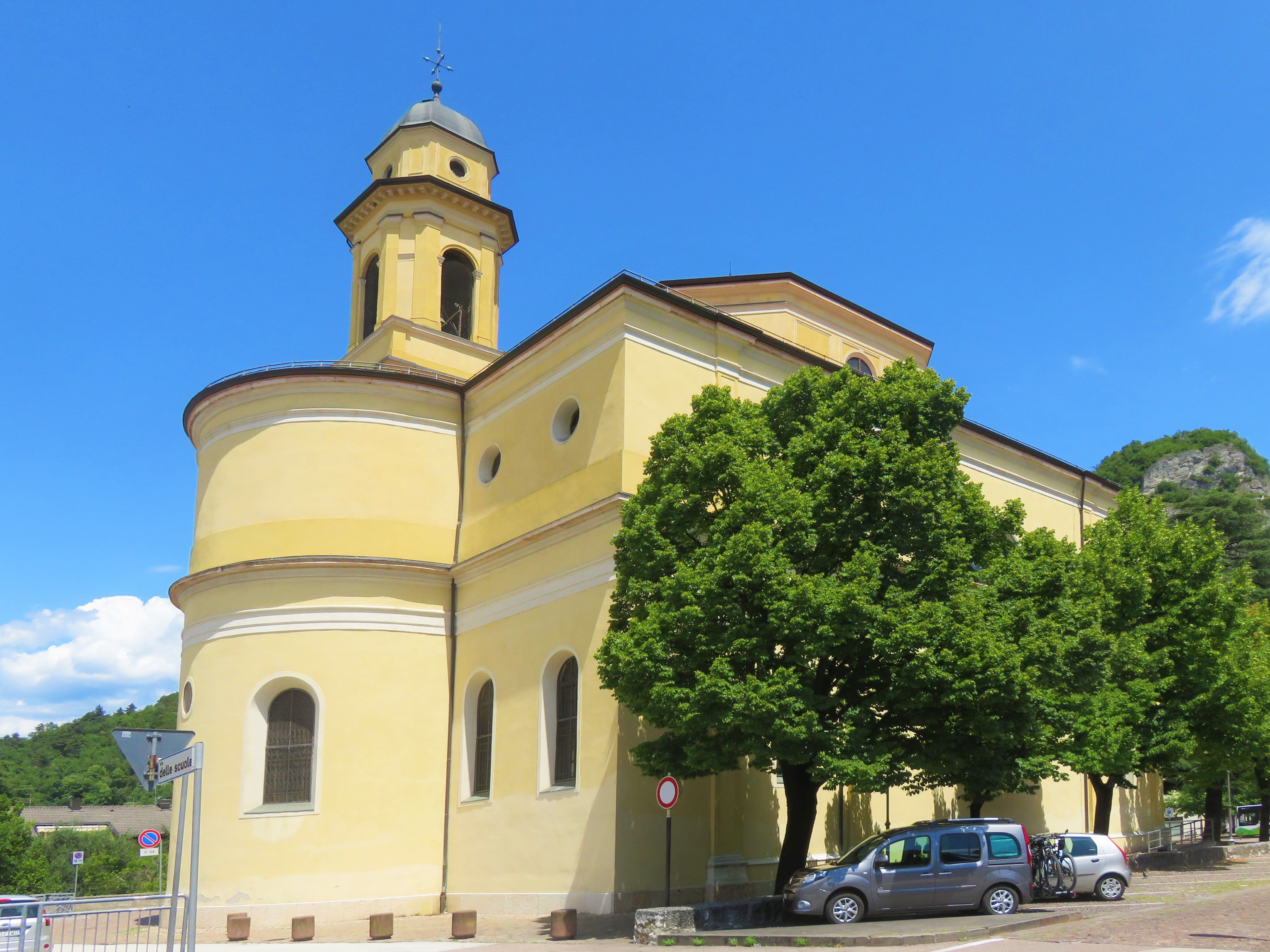 Chiesa della Visitazione di Maria Santissima di Gardolo. Lato destro, abside e campanile.